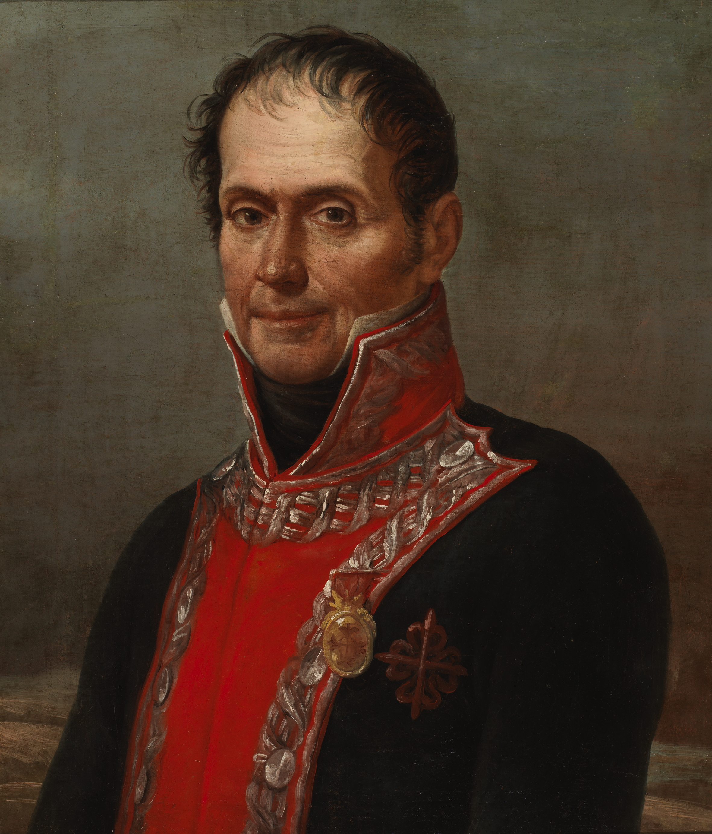 Retrato del general español Francisco Xavier Venegas (1754-1838), que llegó a ser virrey de la Nueva España, capitán general de Galicia y caballero de la Orden de Calatrava.